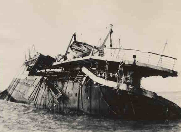 Naufrage Champo1